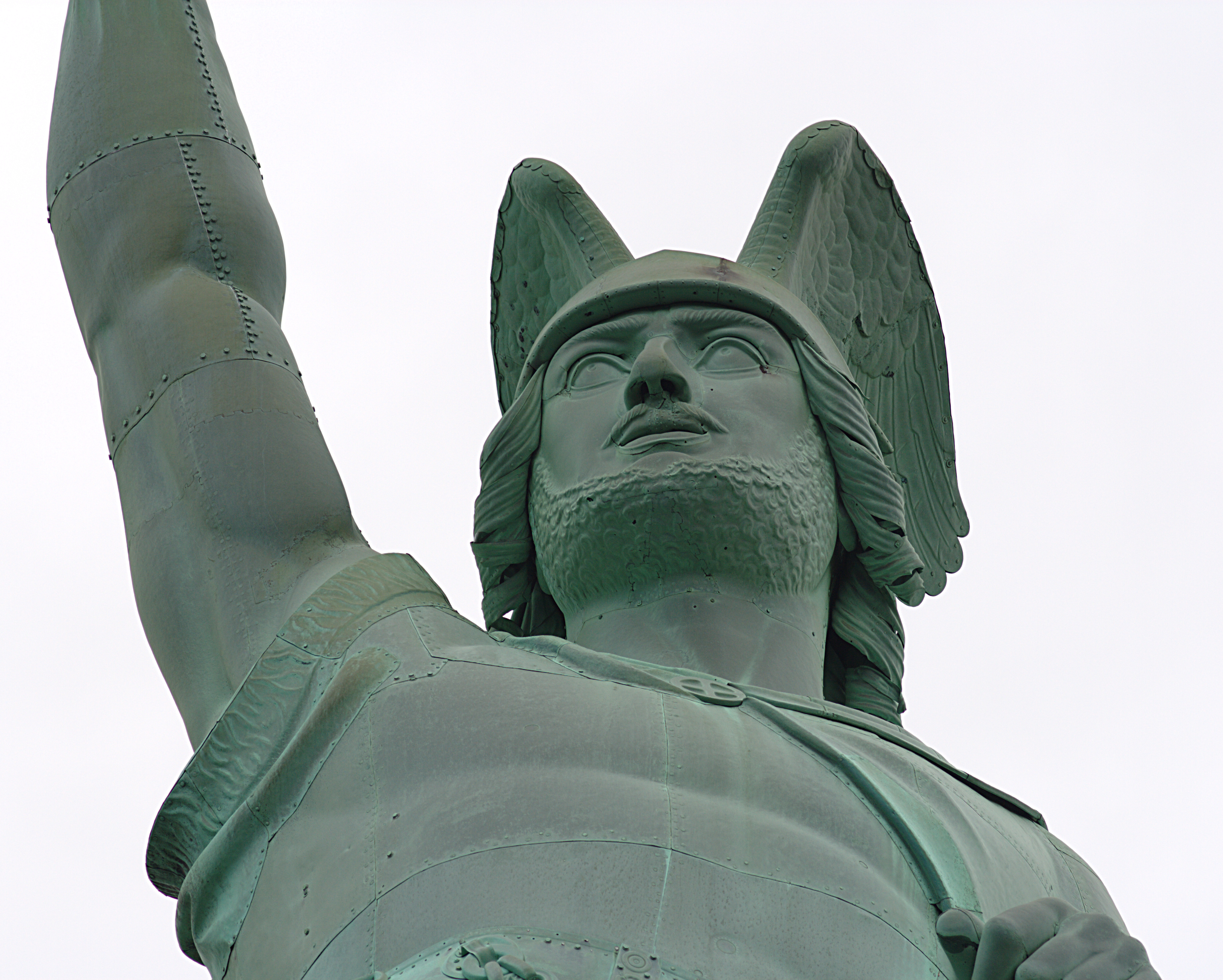 Hermannsdenkmal